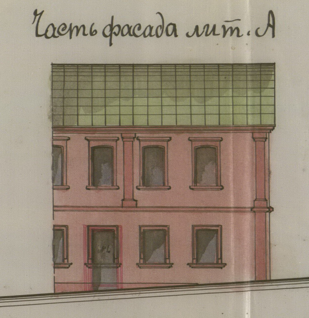 Беларуская (тарашкевіца): Менск (Miensk), вуліца Койданаўская (vulica Kojdanaŭskaja). Дом Гальперына (Halpieryn)